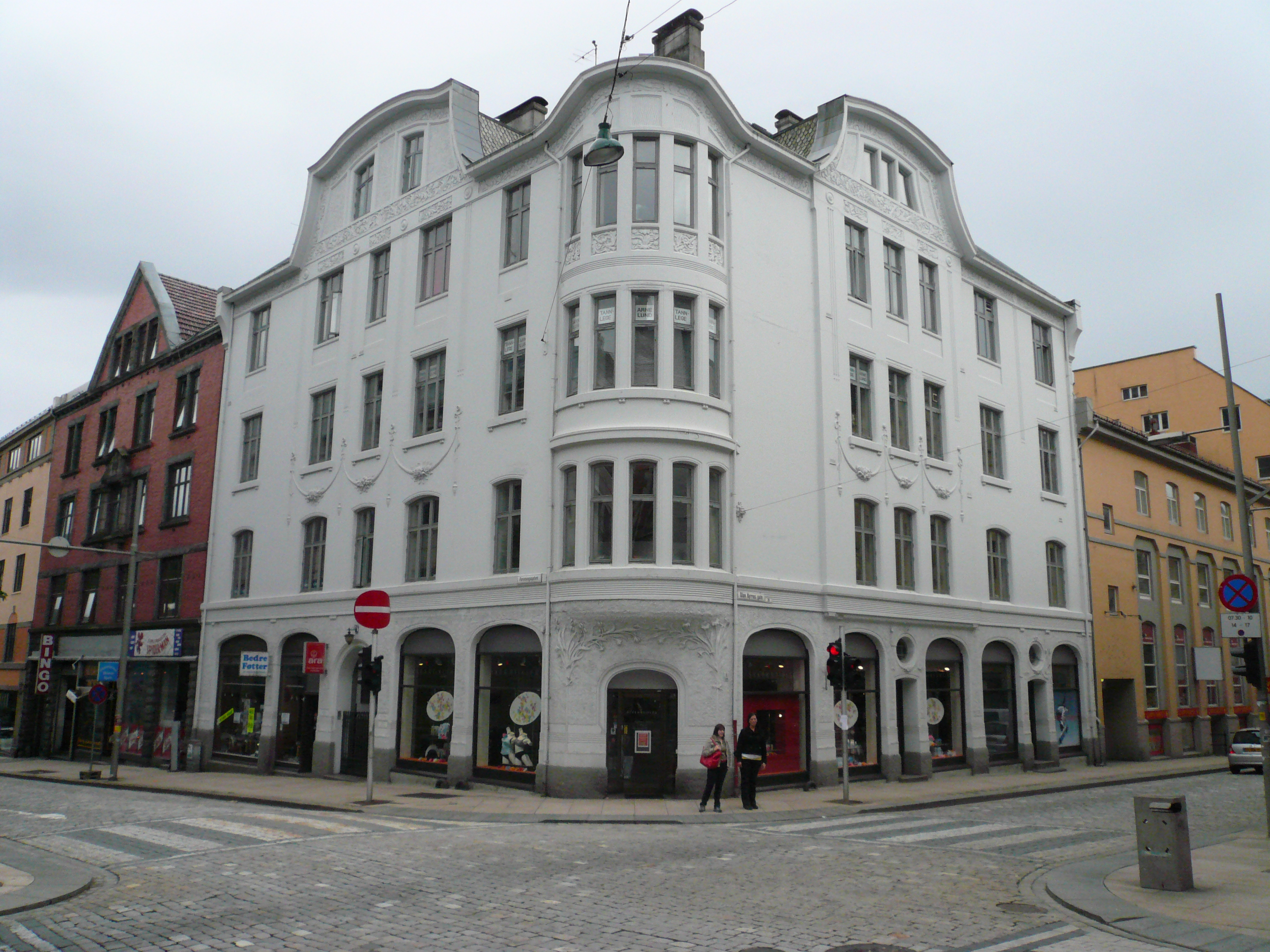 Det hvite hus i Bergen